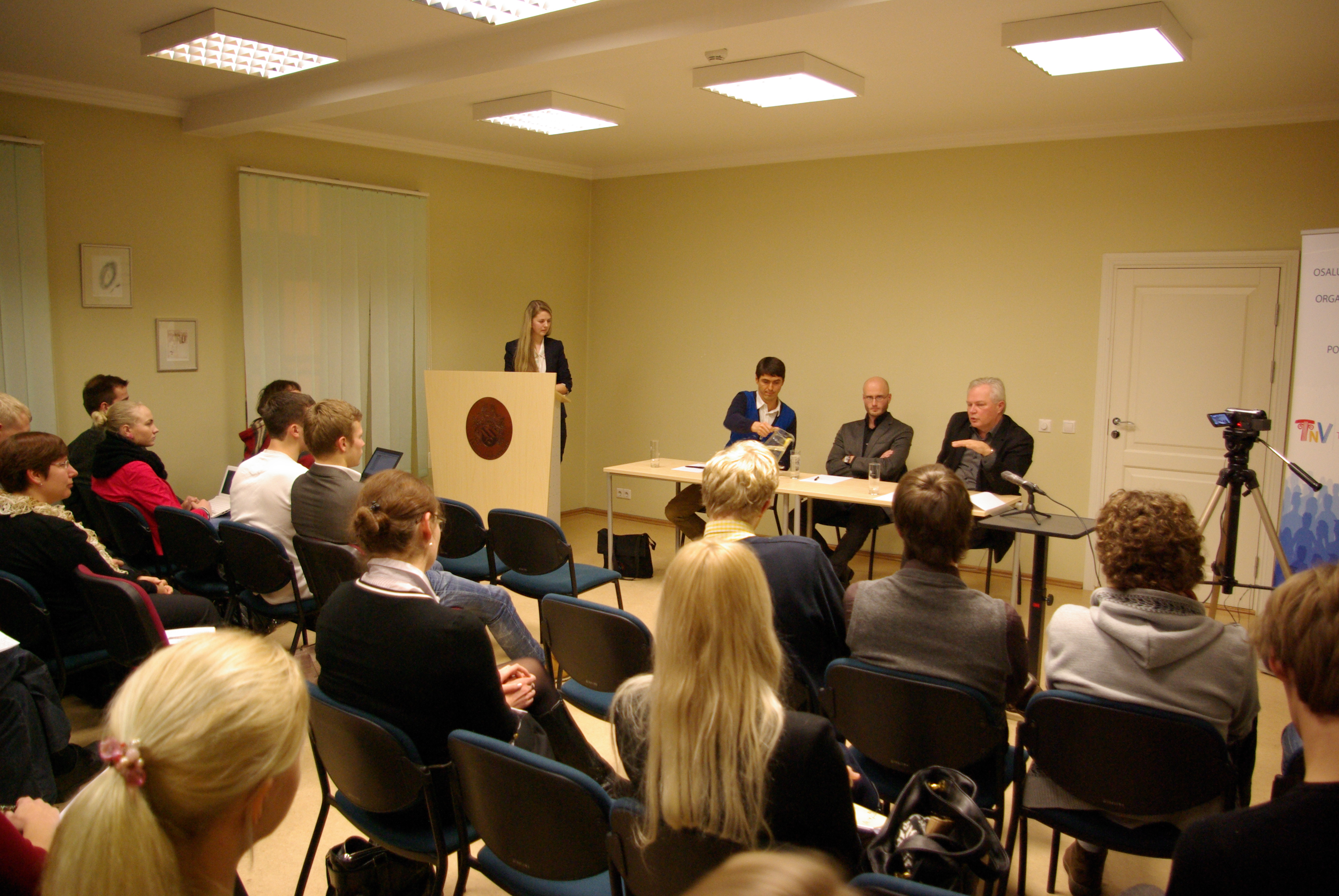 Tartu Noortevolikogu ja Domus Dorpatensise korraldatud paneeldiskussioon DASA-de teemal jaanuaris 2012. Osalesid (vasakult paremale) Urmo Kübar, Mihkel Solvak ja Rait Maruste.